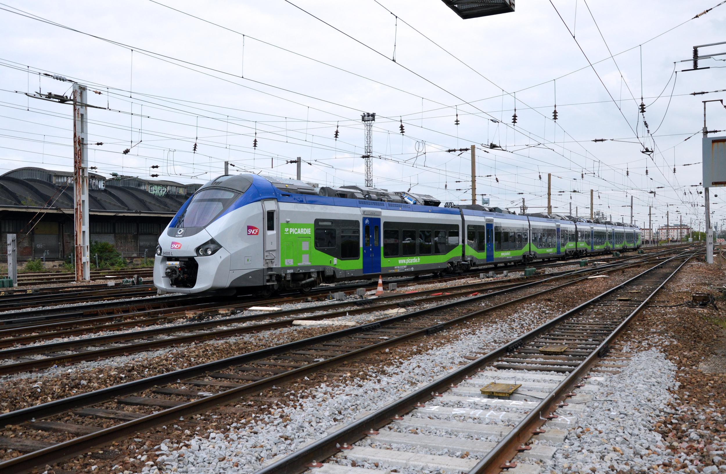 Rame Régiolis B 84505/506 L arrive à Amiens